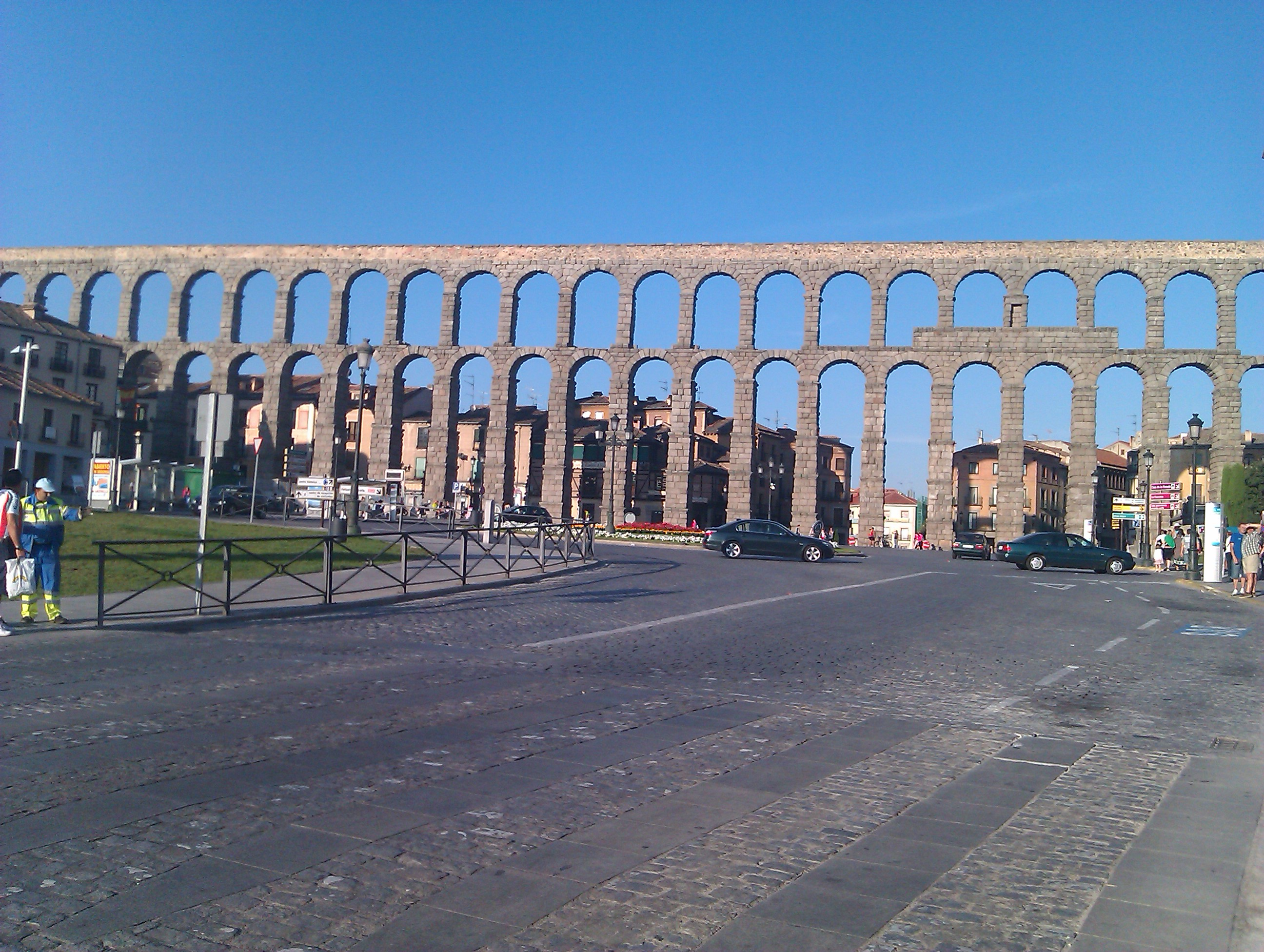 panoramico del acueducto de Segovia